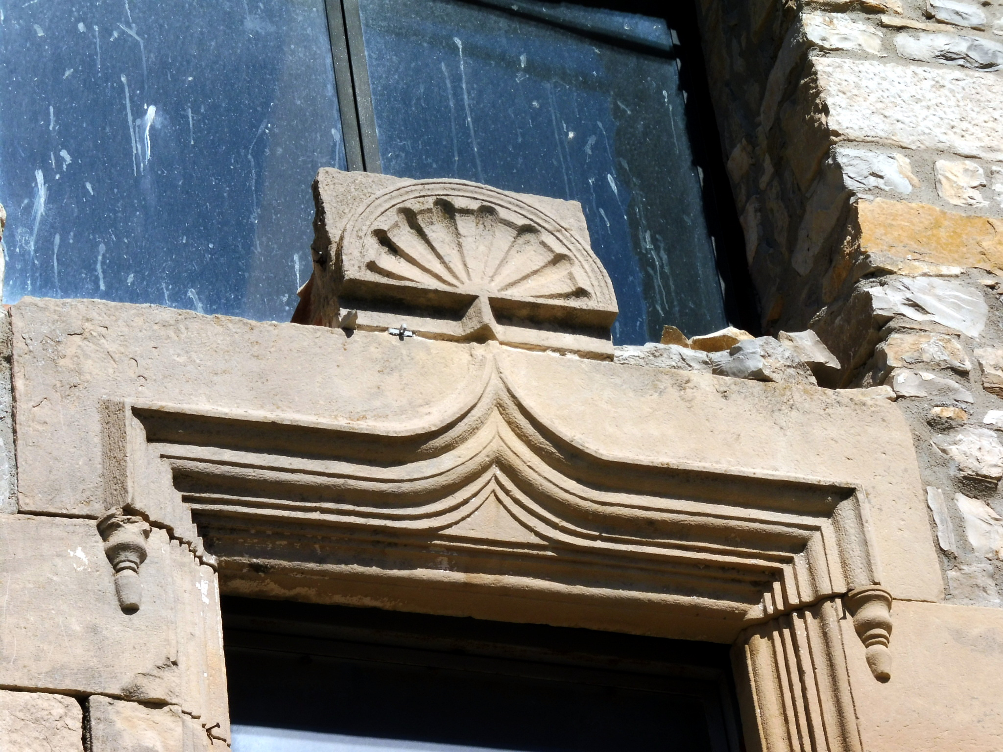 Cal Garra de la Guàrdia Lada (Montoliu de Segarra): detall del balcó